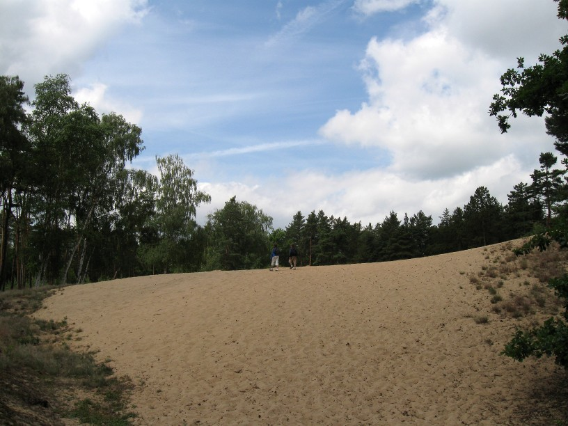 Písečný přesyp u Píst